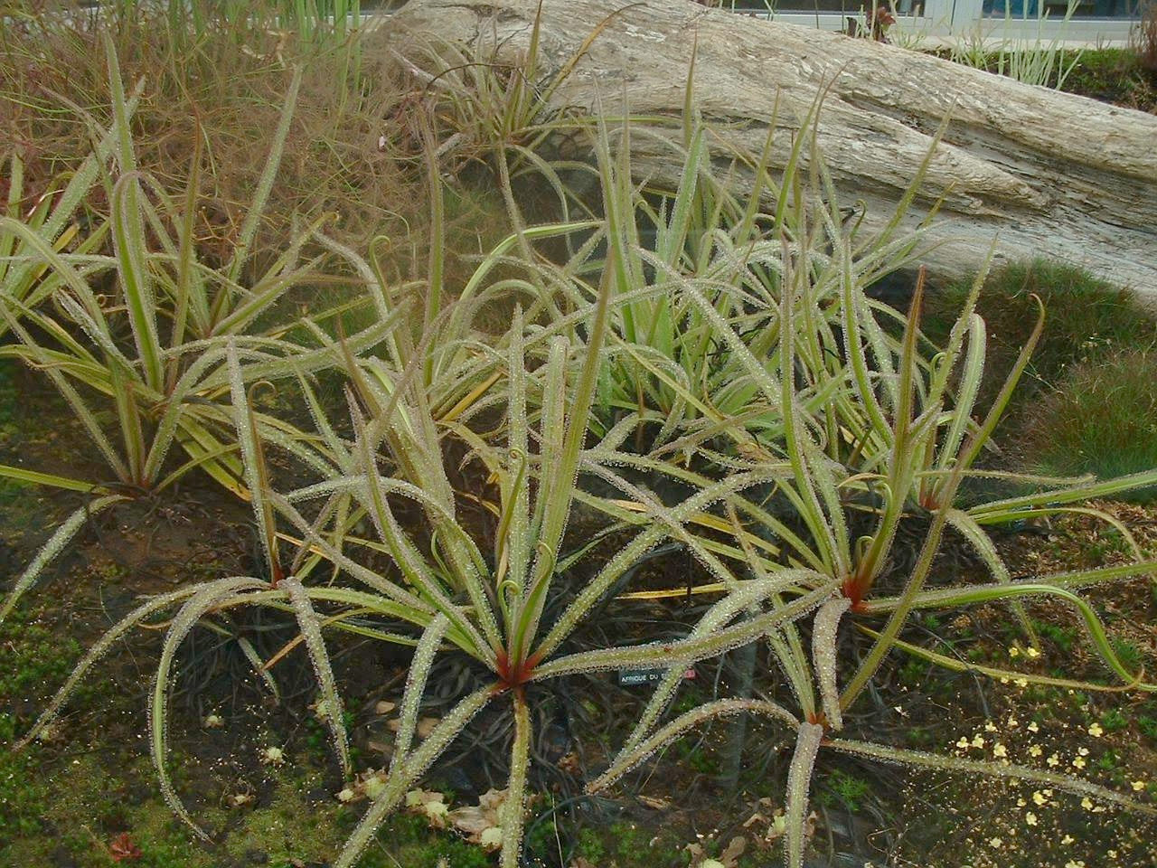 Drosera regia